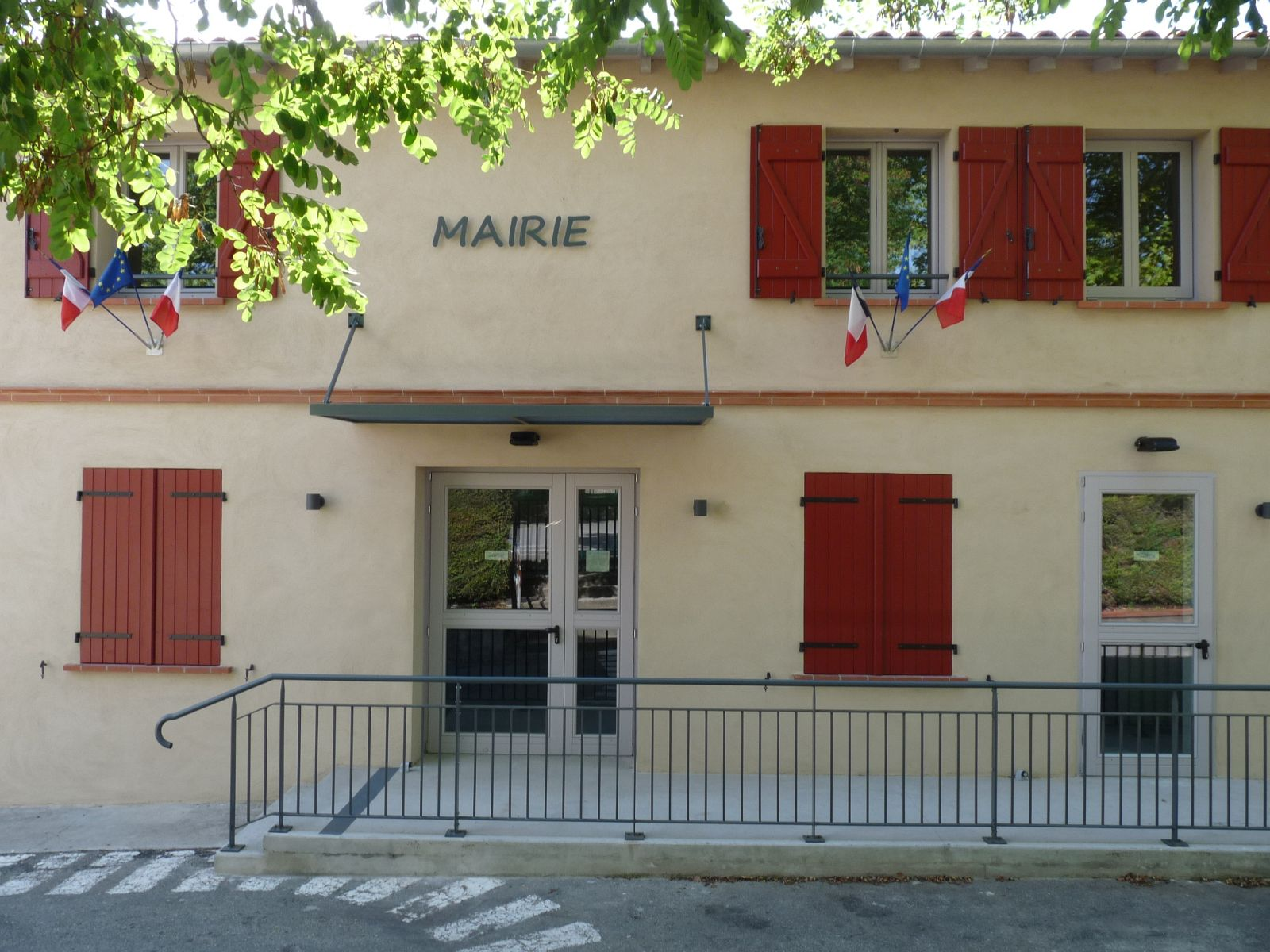 Mairie de Vieillevigne, Haute-Garonne, France